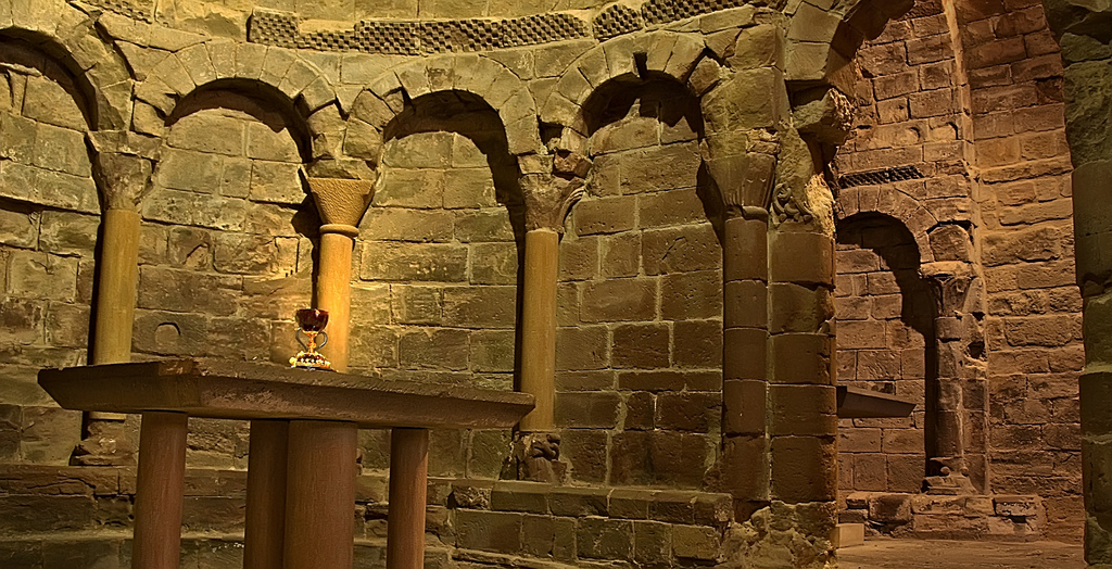 El altar mayor del Monasterio de San Juan de la Peña hay una reproducción del Santo Grial (eso se supone)